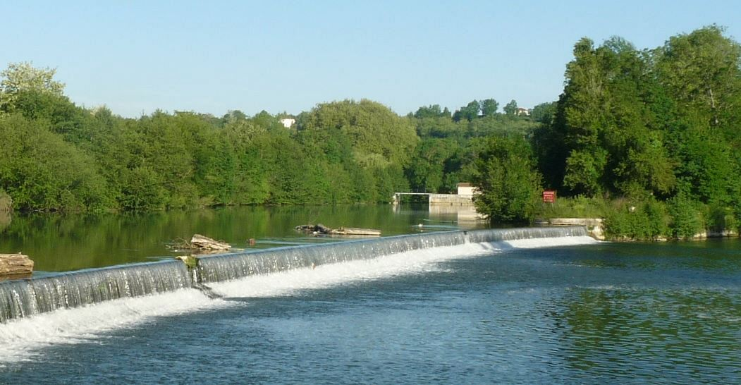 chute d'eau sur la Charente près de Basseau à l'écluse de Touérat, Fléac, Charente, France